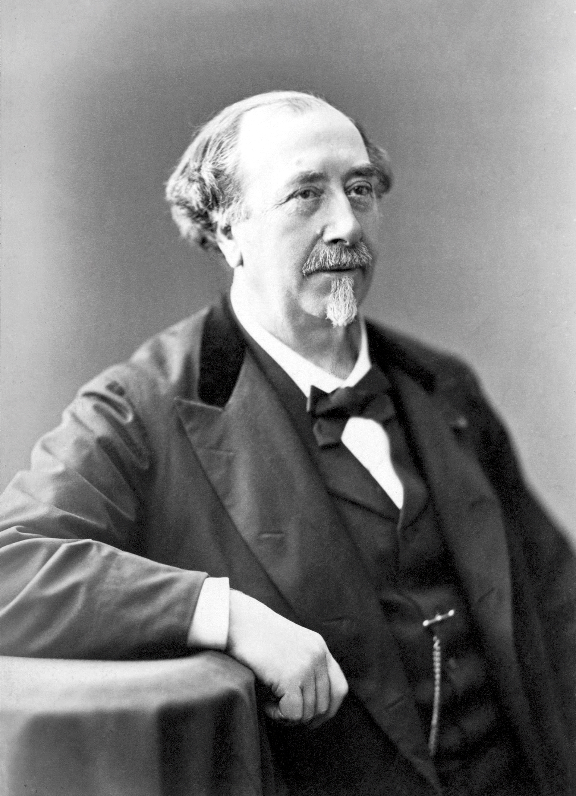 Portrait photographique de Louis Figuier (1819–1894), écrivain et vulgarisateur scientifique français par Nadar.